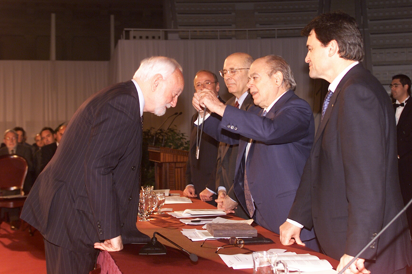 Francesc Vendrell rep la Creu de Sant Jordi de mans del President Pujol (2002)